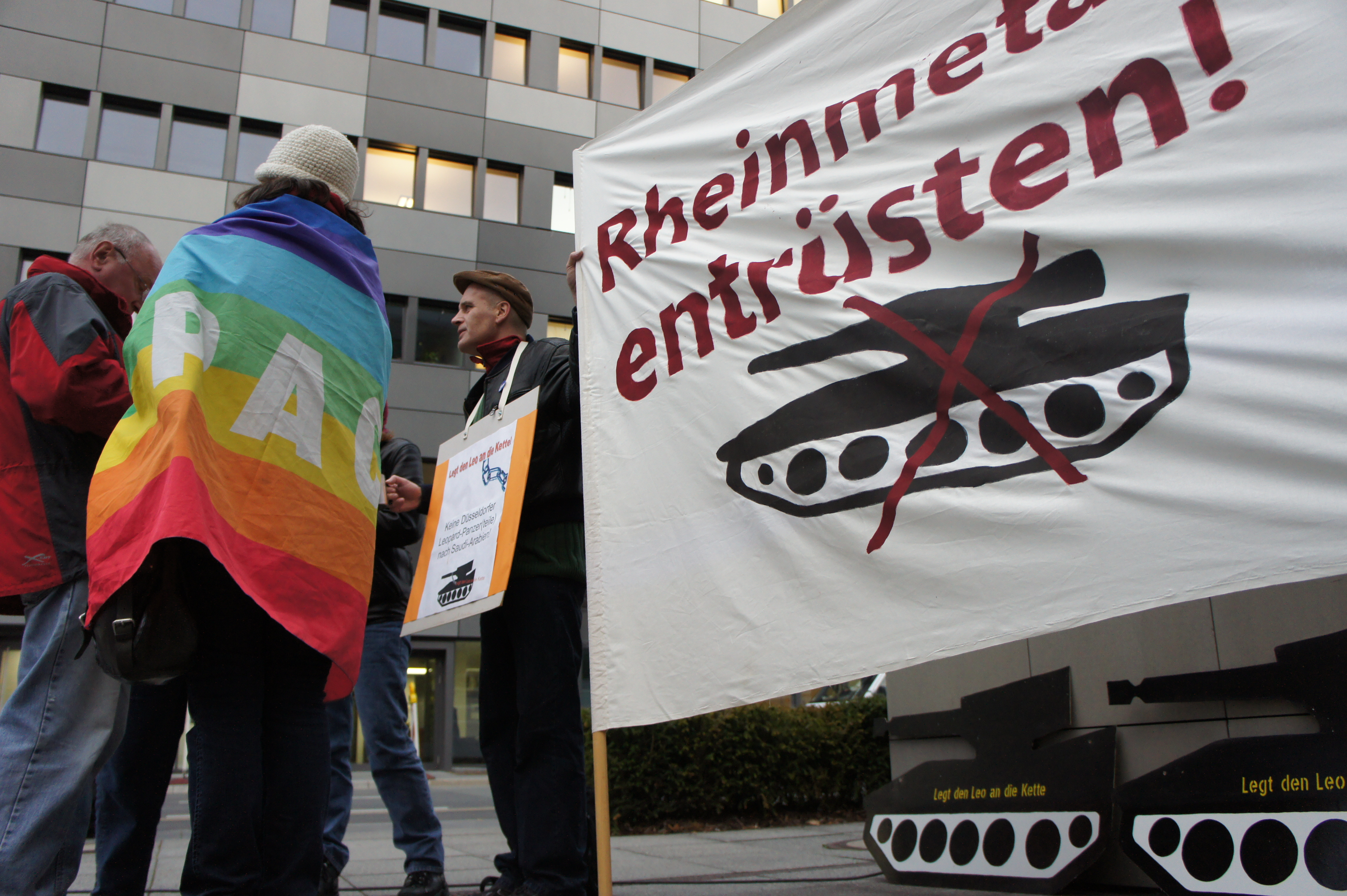 Vor der Zentrale der Rheinmetall AG, Düsseldorf am 26.10.2012 Kampagene "Aktion Aufschrei - Stoppt den Waffenhandel"